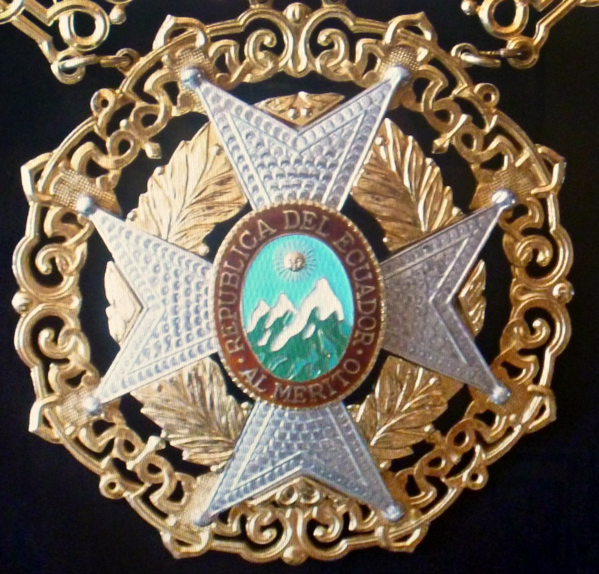 Venera de la Gran Cruz de la Orden Nacional al Mérito, de la República del Ecuador.